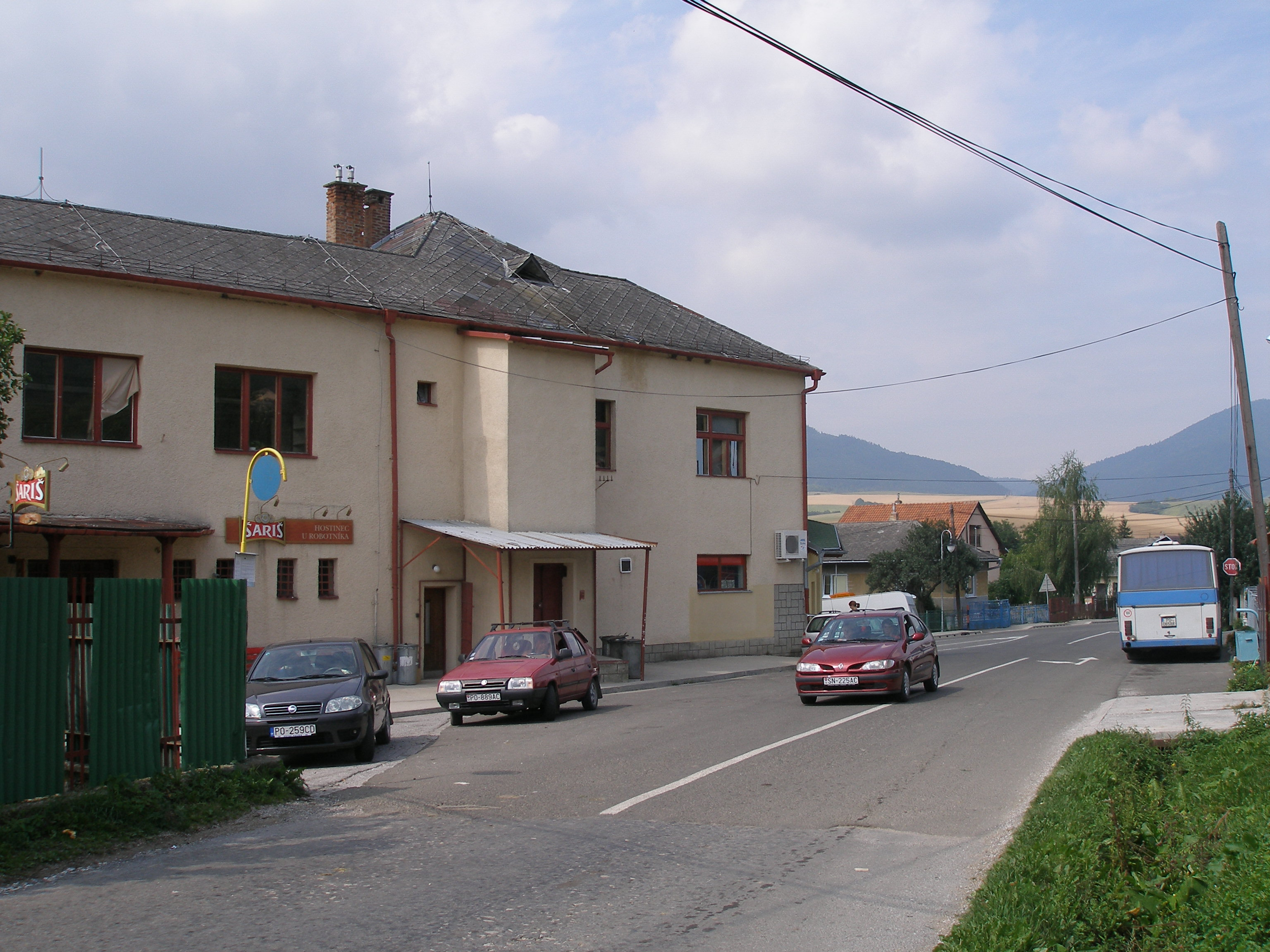 Šarišská obec Víťaz